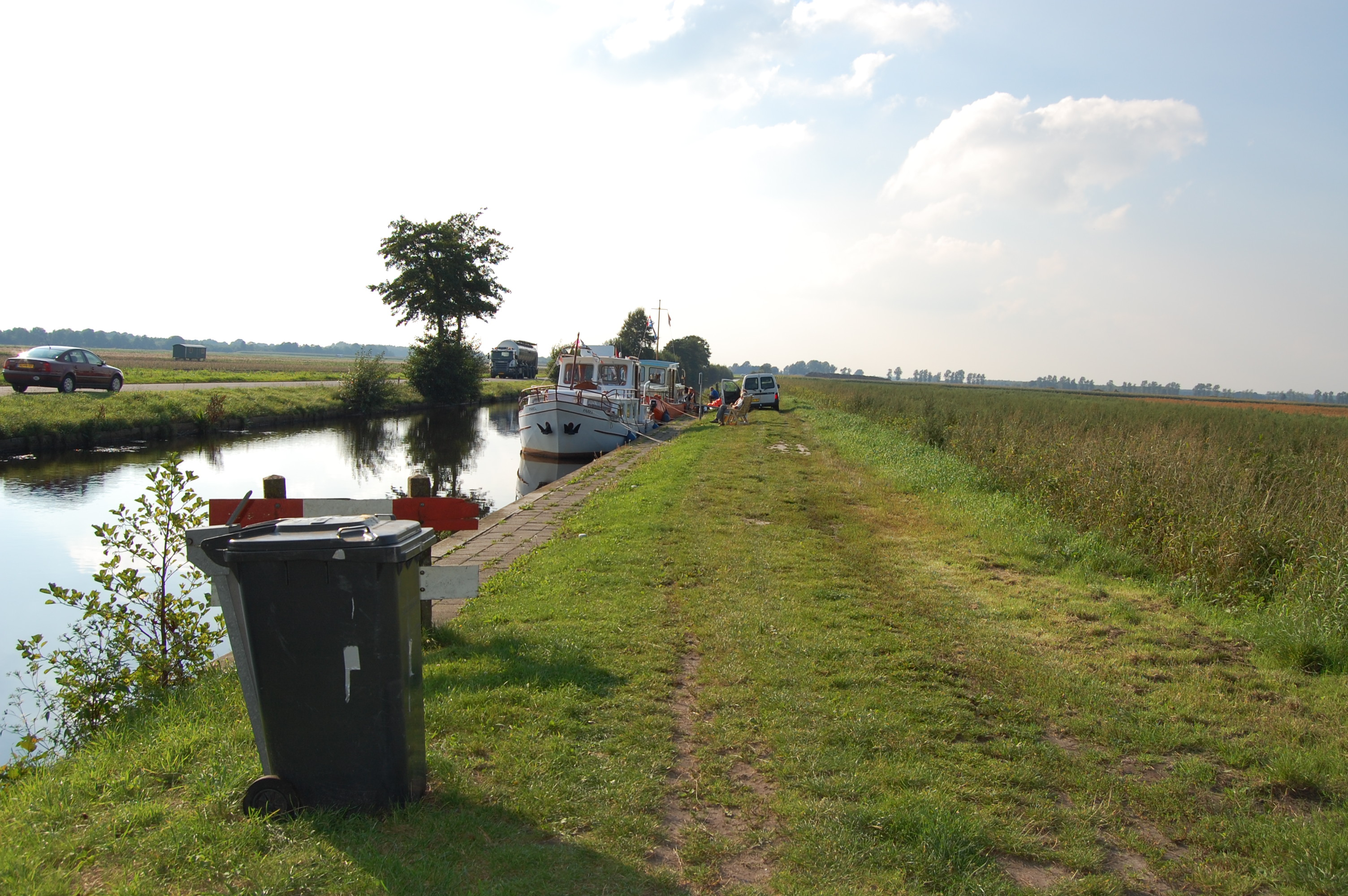 Aanlegplaatsen voor jachten in de Witte-Wijk aan het begin van de Opsterlandse-Compagnonsvaart ter hoogte van de Drentse-Hoofdvaart.